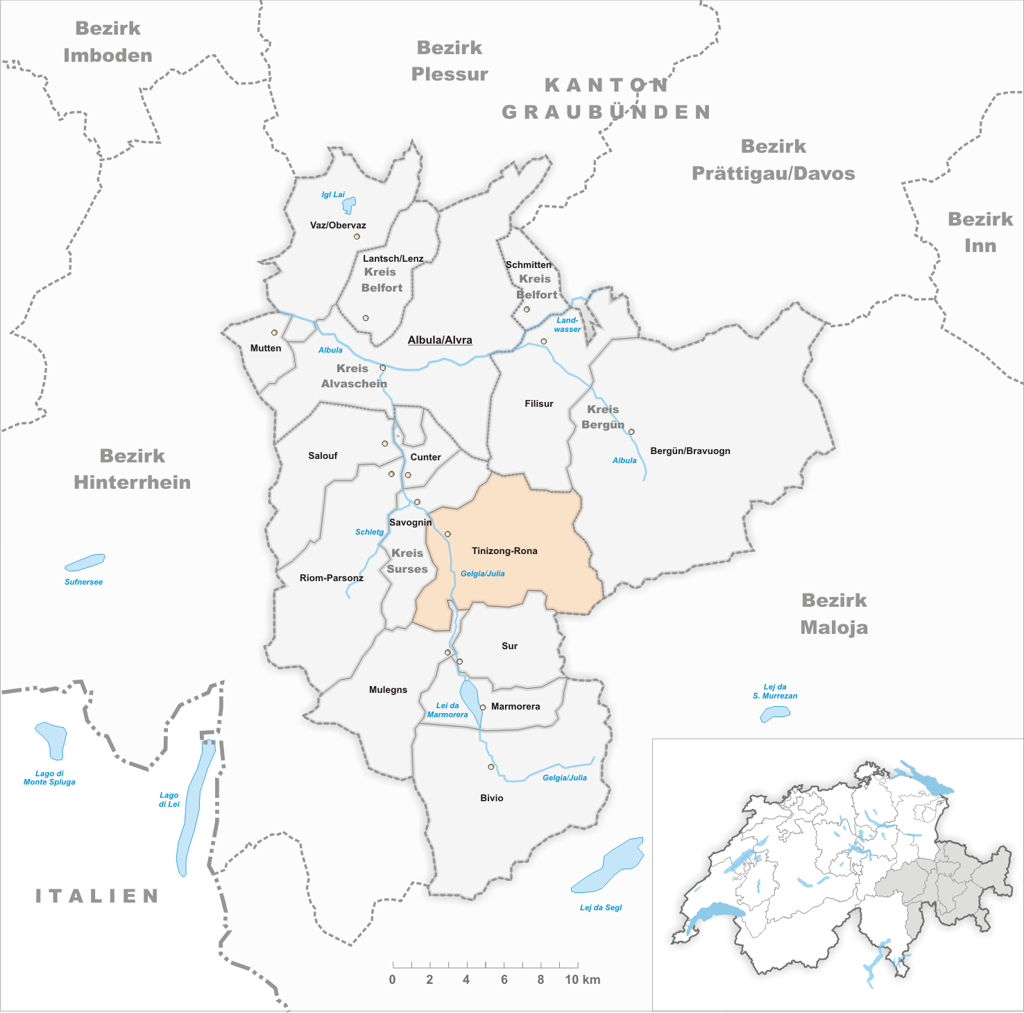 Municipality Tinizong-Rona